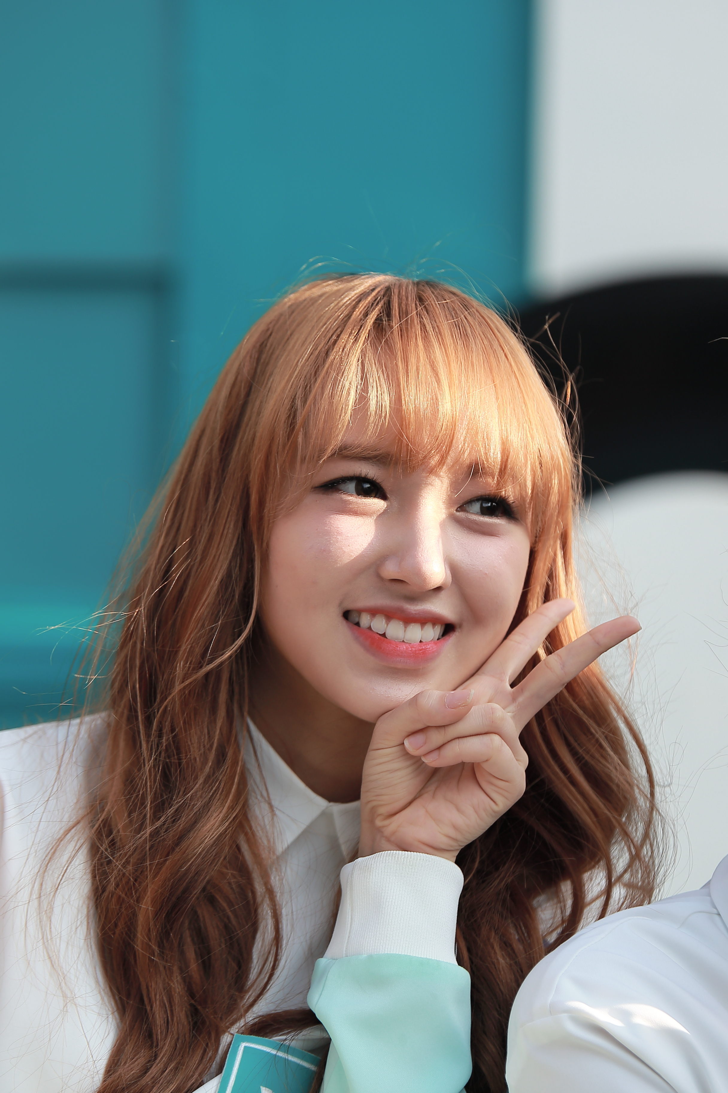 160618 우주소녀 직찍 #001